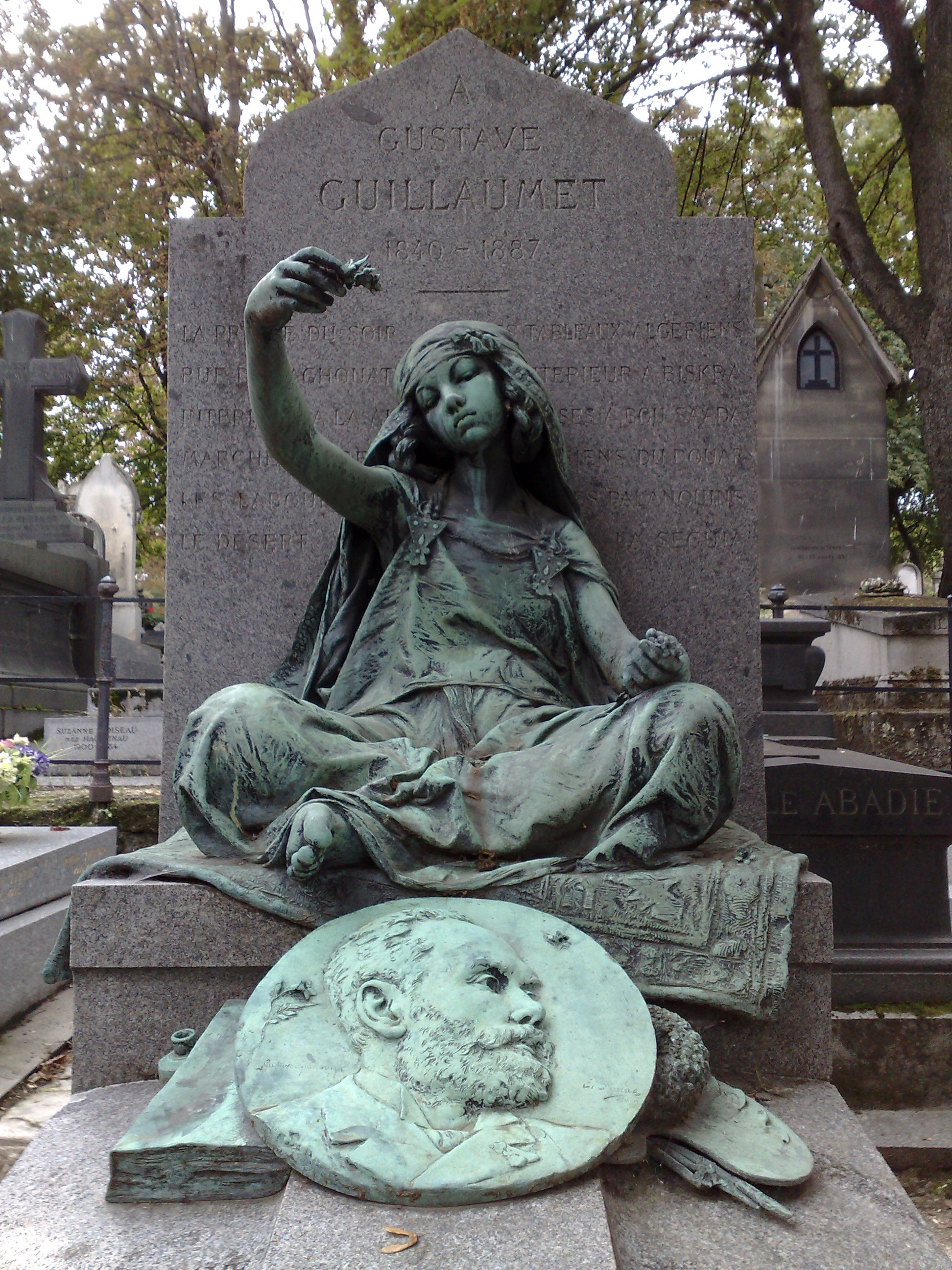 Grab von Gustave Guillaumet (1840–1887)